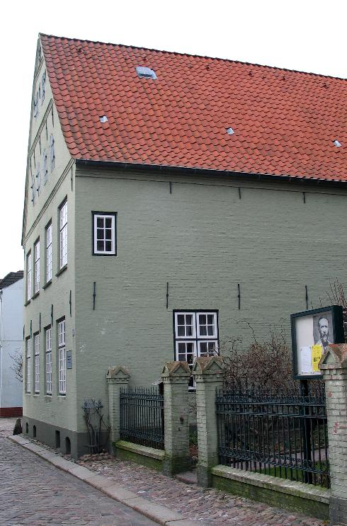 Stormhaus in Husum Fotografiert von Bernd Untiedt am 06. März 2004